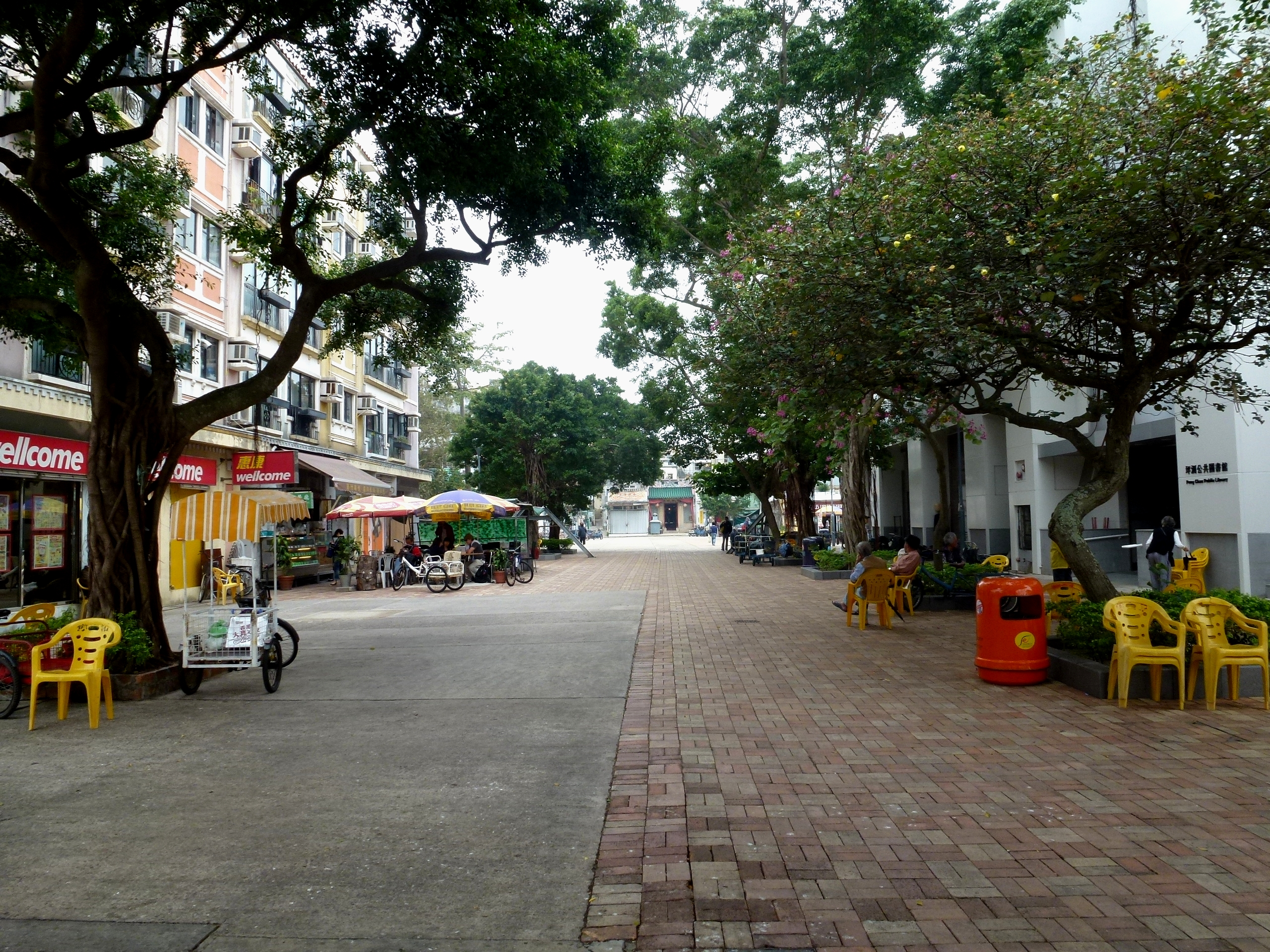 Peng Chau Island Hong Kong